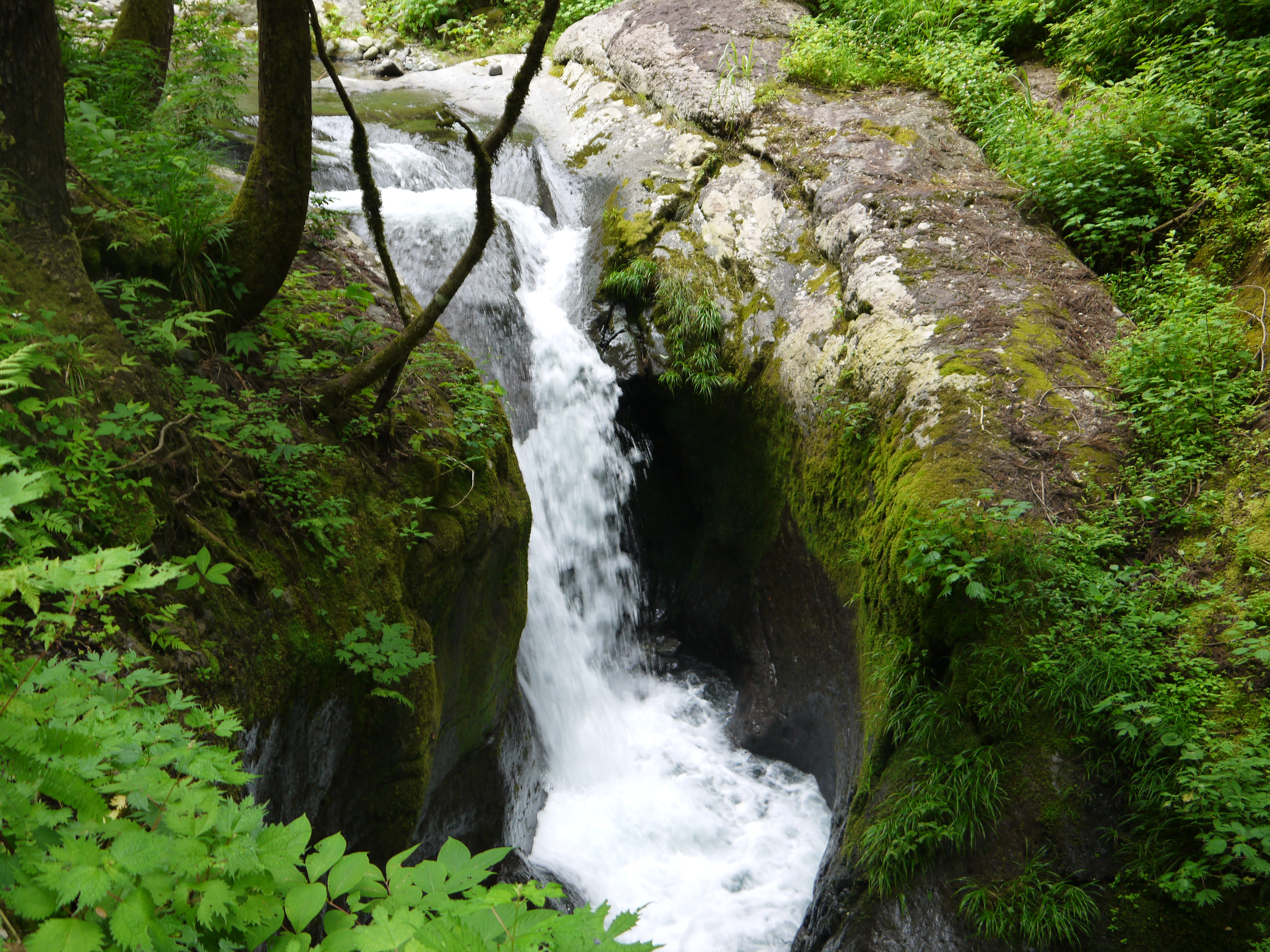 龍双ヶ滝付近の甌穴群